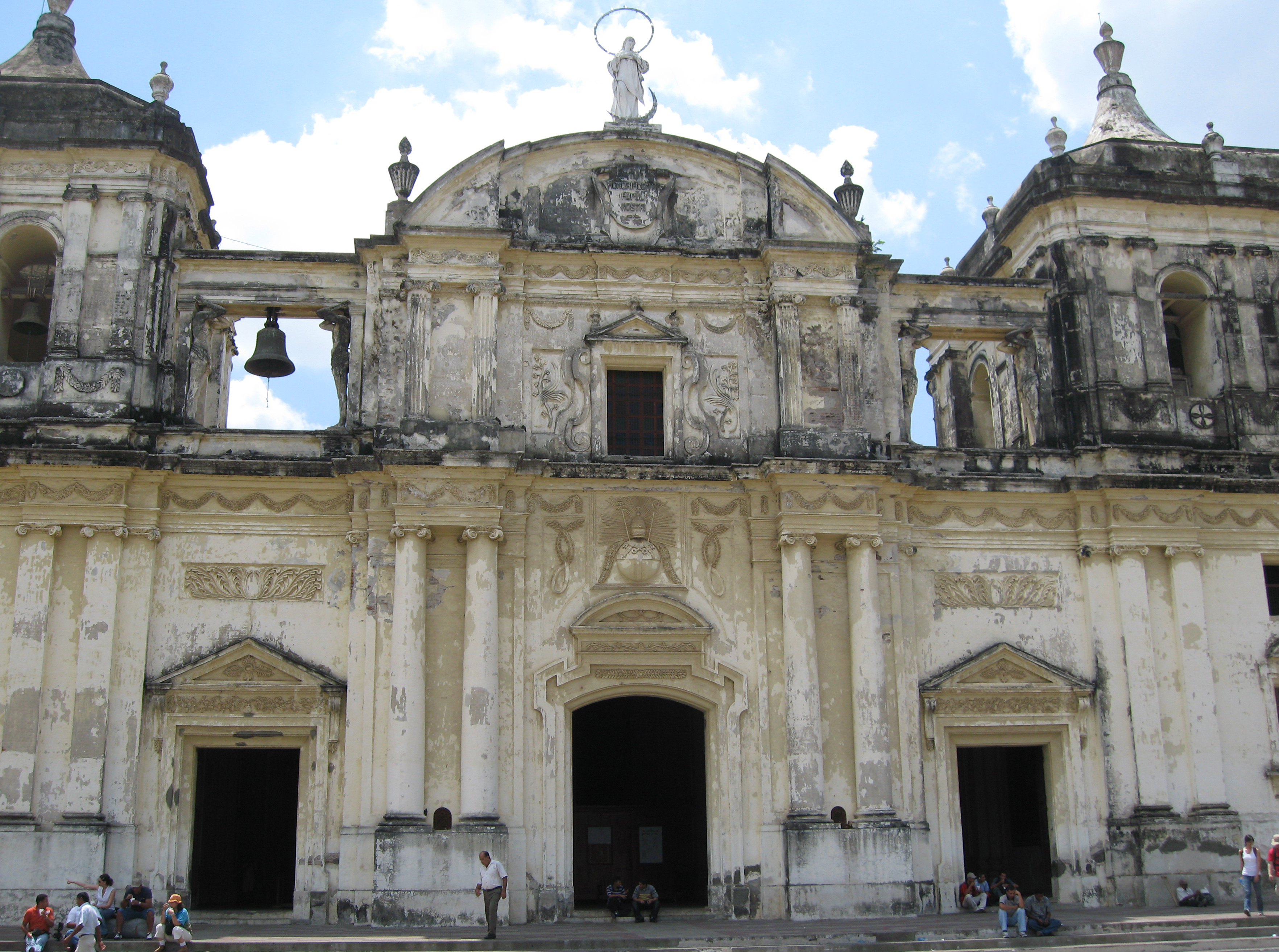 Catedral de la Asunción, León